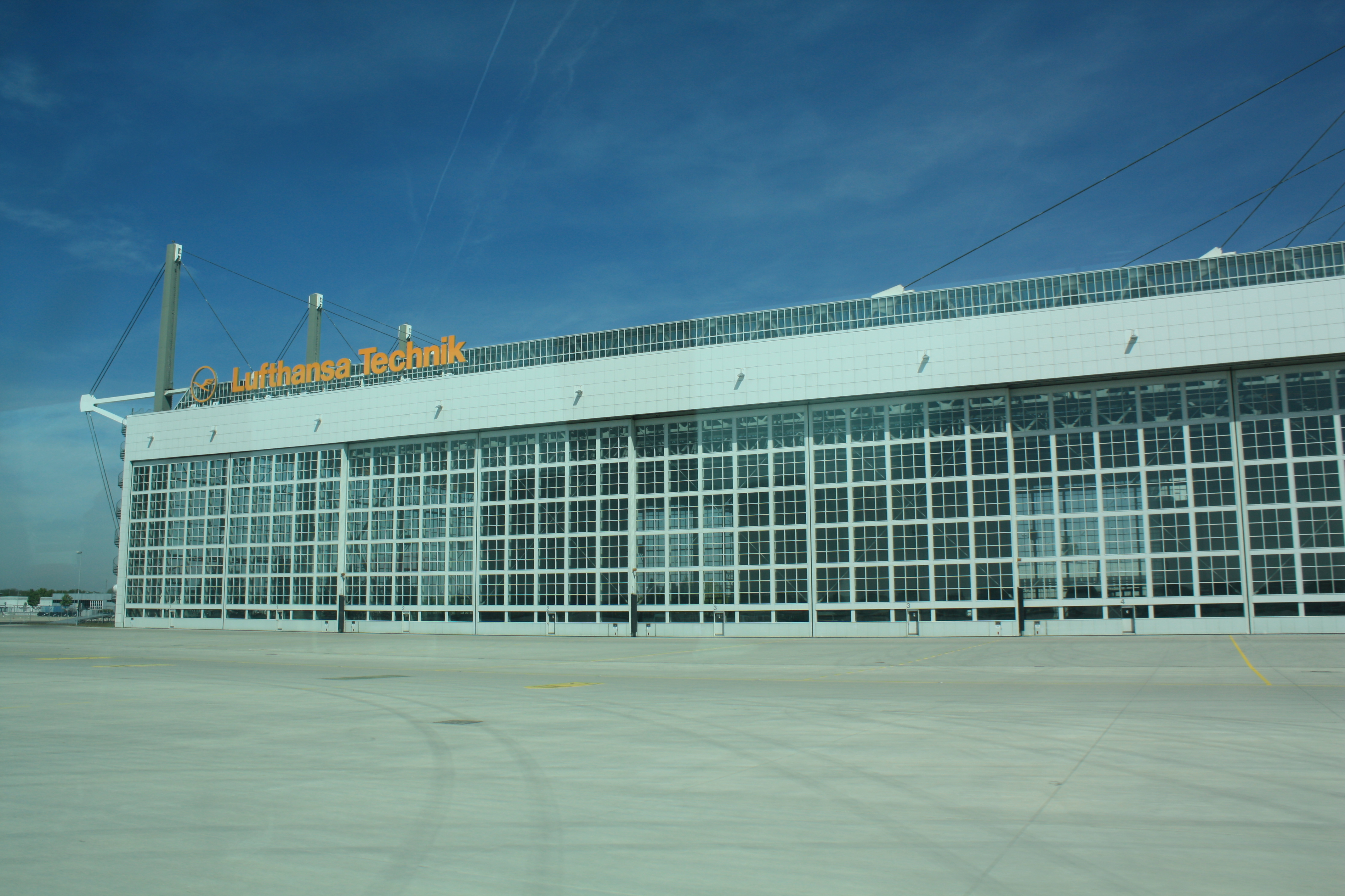 Lufthansa Wartungshalle